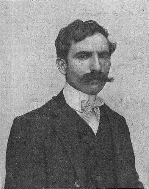 Fermín Arango, en la revista española La Ilustración Artística.